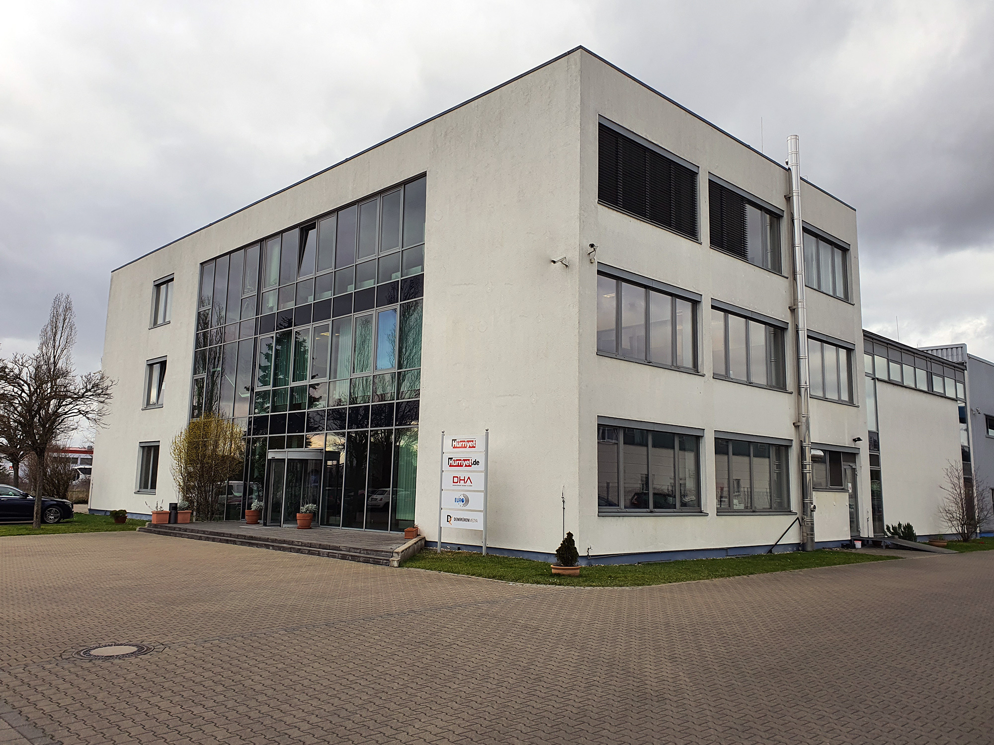 Das Firmengebäude von Hürriyet.de in Mörfelden-Walldorf